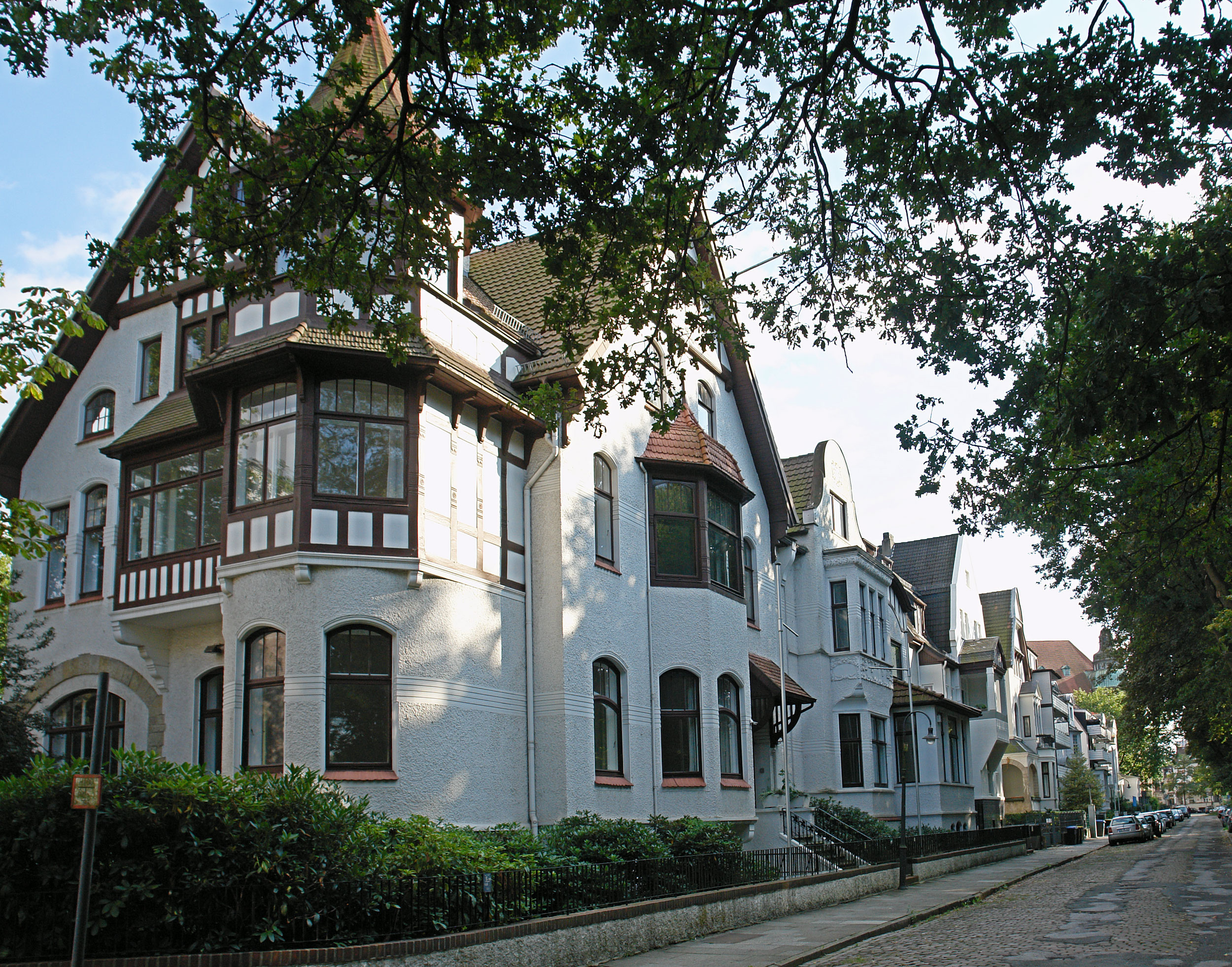 Wohnhausgruppe in Bremen, Blumenthalstraße 16–12a, Richtung Hermann-Böse-StraßeDie Denkmalgruppe ist ein geschütztes Kulturdenkmal in der Freien Hansestadt Bremen, mit der Nr. 0059 beim Landesamt für Denkmalpflege registriert.